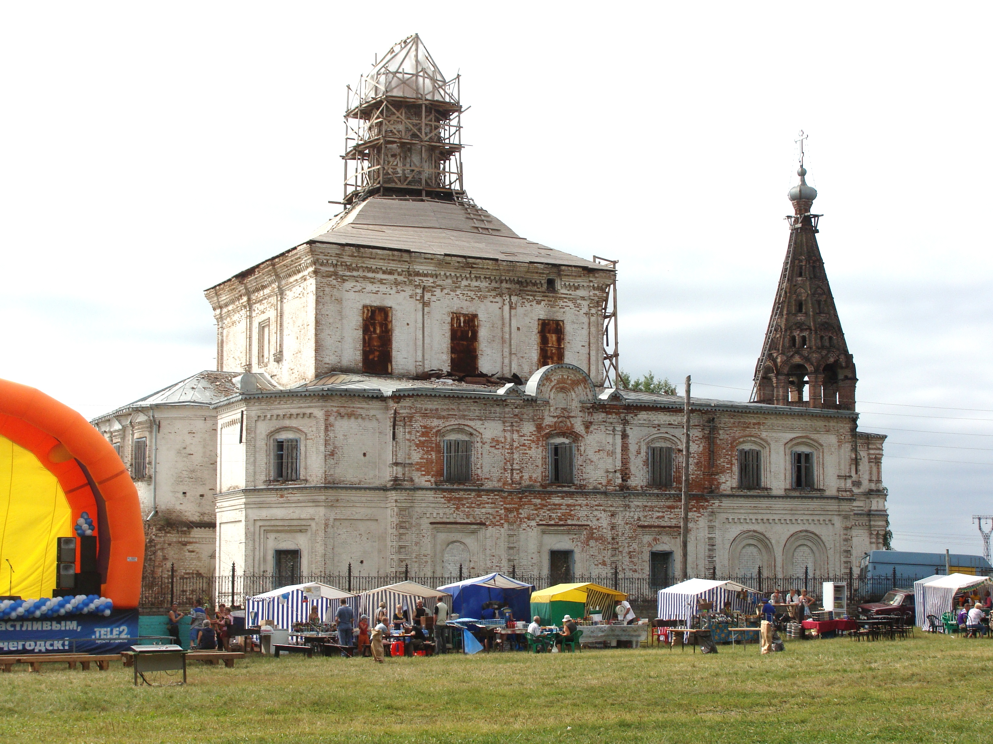 Фестиваль Козьмы Пруткова 24 июля 2010 года